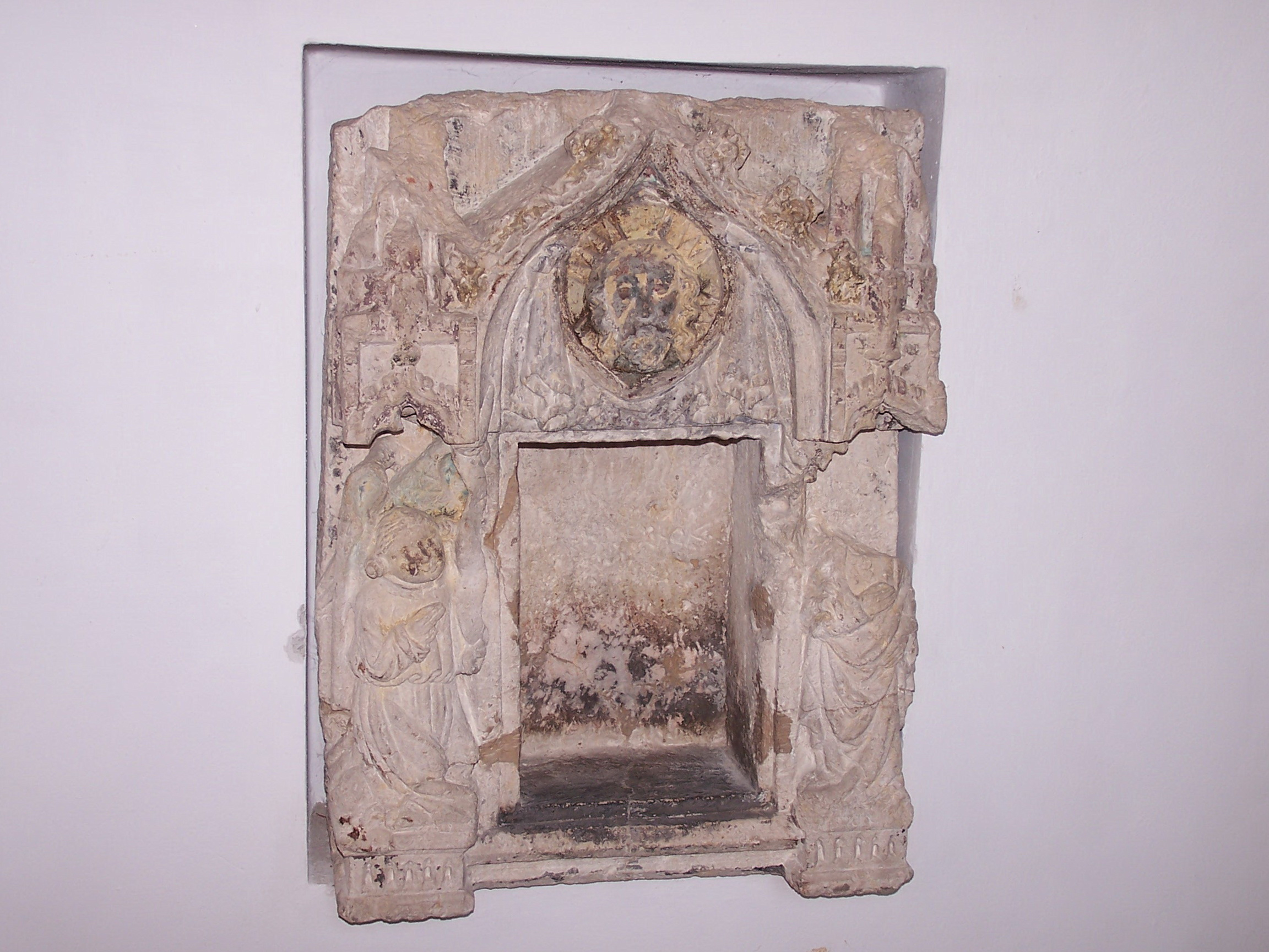 Langquaid Marktplatz 14. Katholische Pfarrkirche St. Jakob d. Ä. Saalkirche mit Steildach, eingezogenem Rechteckchor und Chorscheitelturm, Portalvorhalle nach Süden, Chor und Turm im Kern romanisch, 13. Jahrhundert, Langhaus spätgotisch, 15. Jahrhundert, Barockisierung der Anlage um 1740, Verlängerungen nach Westen, 1917 und 2004; mit Ausstattung; Seelenkapelle, rechteckiger Satteldachbau, 18. Jahrhundert. Ehemalige Sakramentennische aus Sandstein, Mitte 15. Jahrhundert.